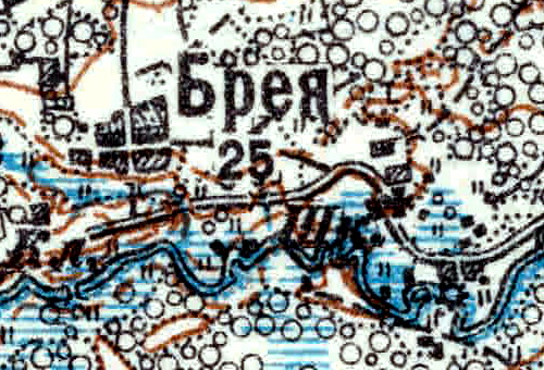 Топографическая карта Ленинградской области, квадрат VIc-27 (Залустижье), деревня Брея